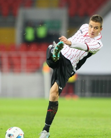 Бранко Йовичич